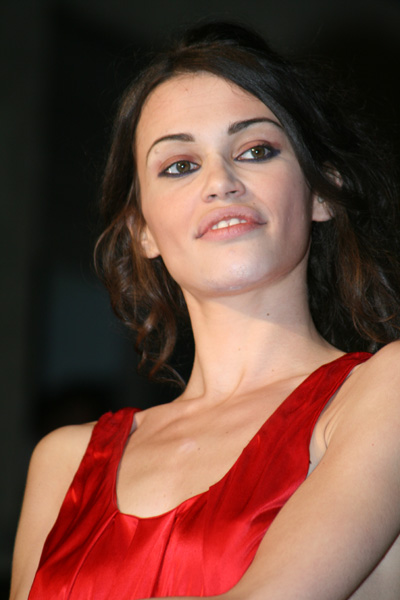 Federica Felini